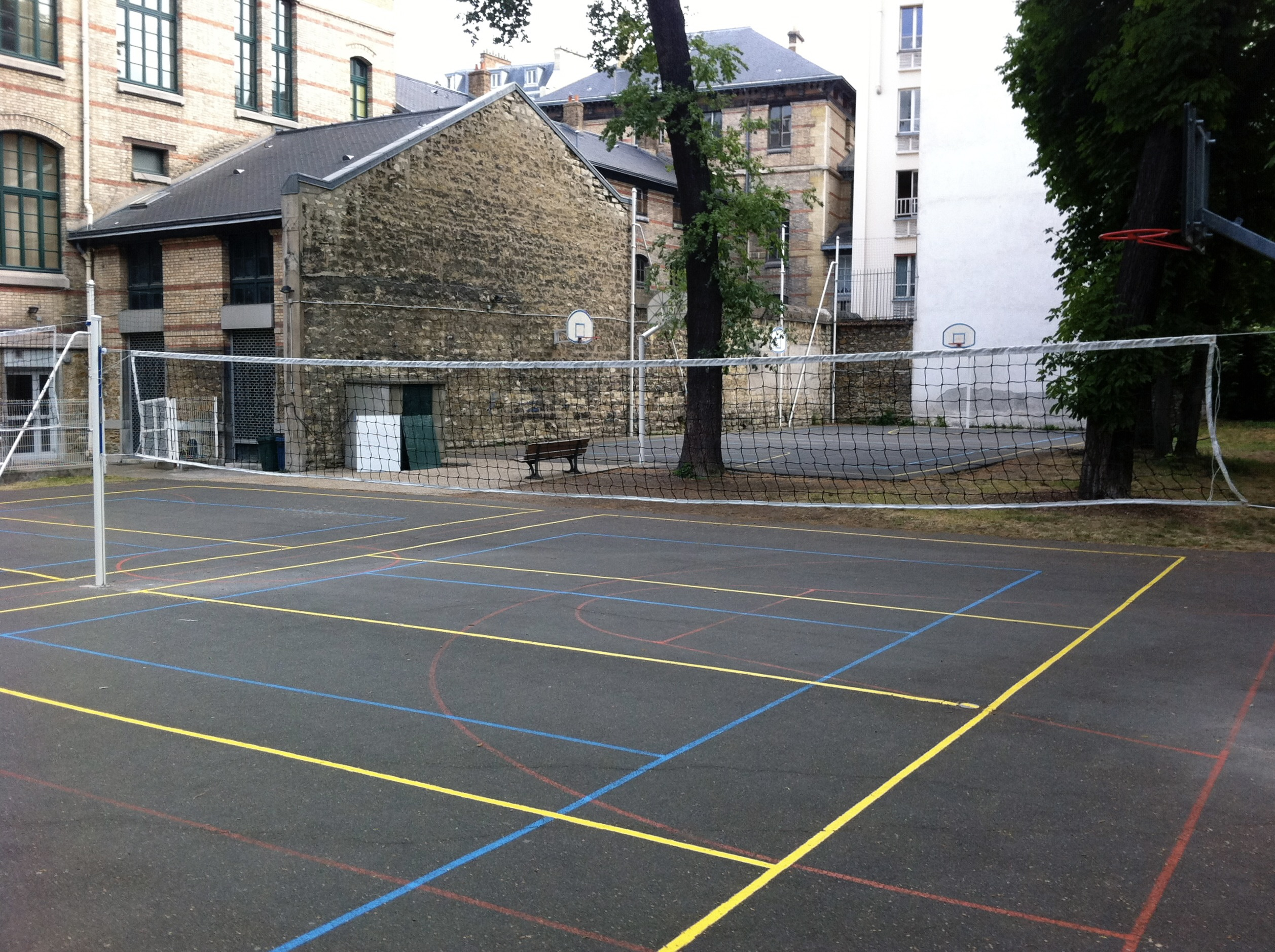 Terrain de sport du lycée Molière (Paris)